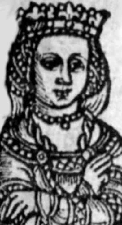 Zofia Holszańska (drzeworyt)